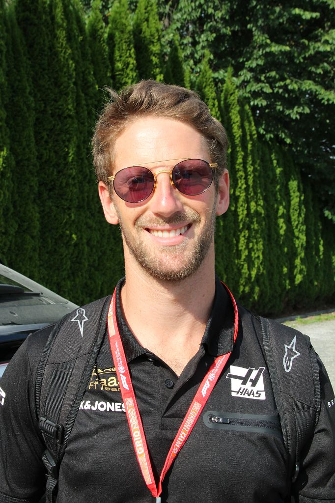 Formula 1 2019 / Schloss Gabelhofen